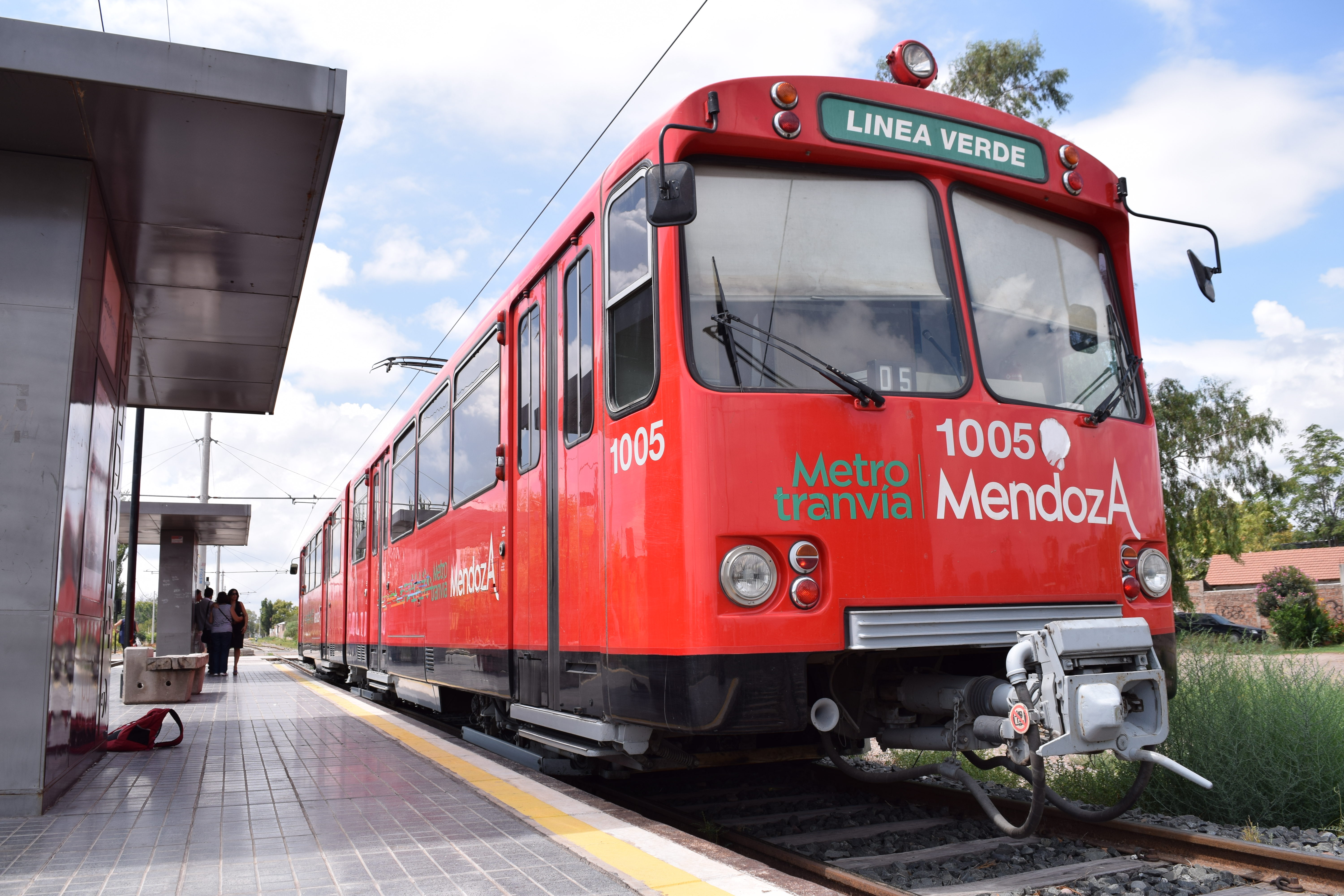 Siemens–Duewag U2 en el Parador 9 de Julio rumbo a Gutierrez.